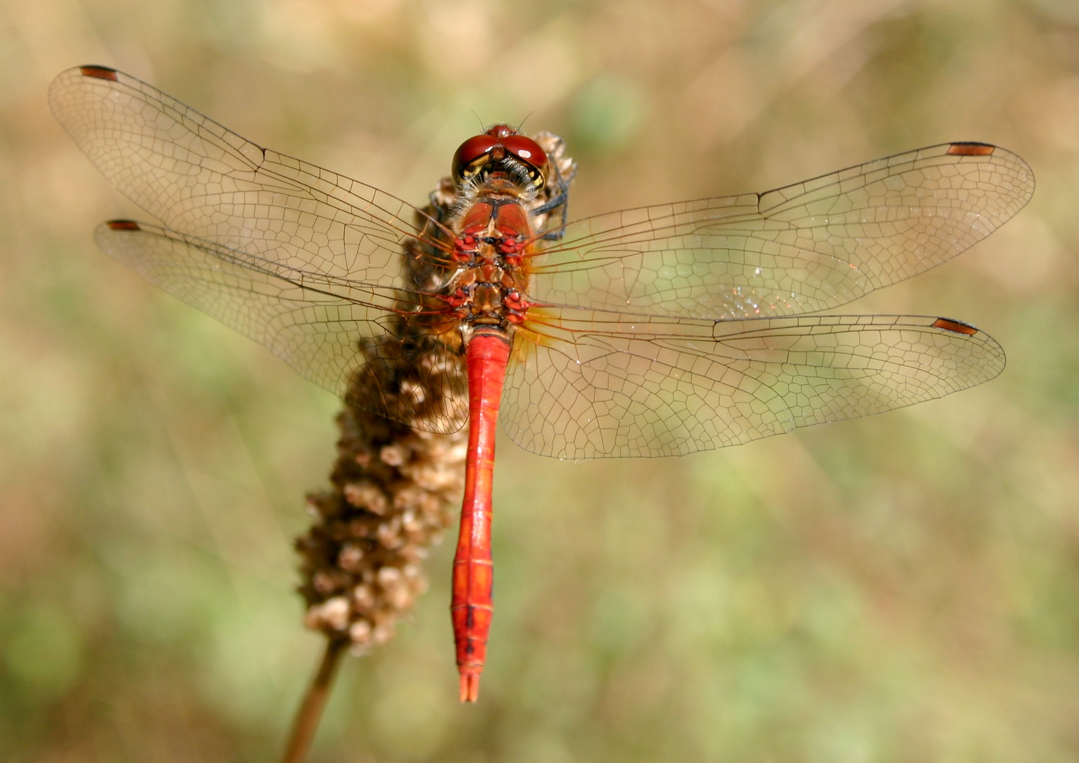 Sympetrum sanguineum, Männchen, Niederung in der Nähe des Lac de Sainte-Croix bei Bauduen, Frankreich.